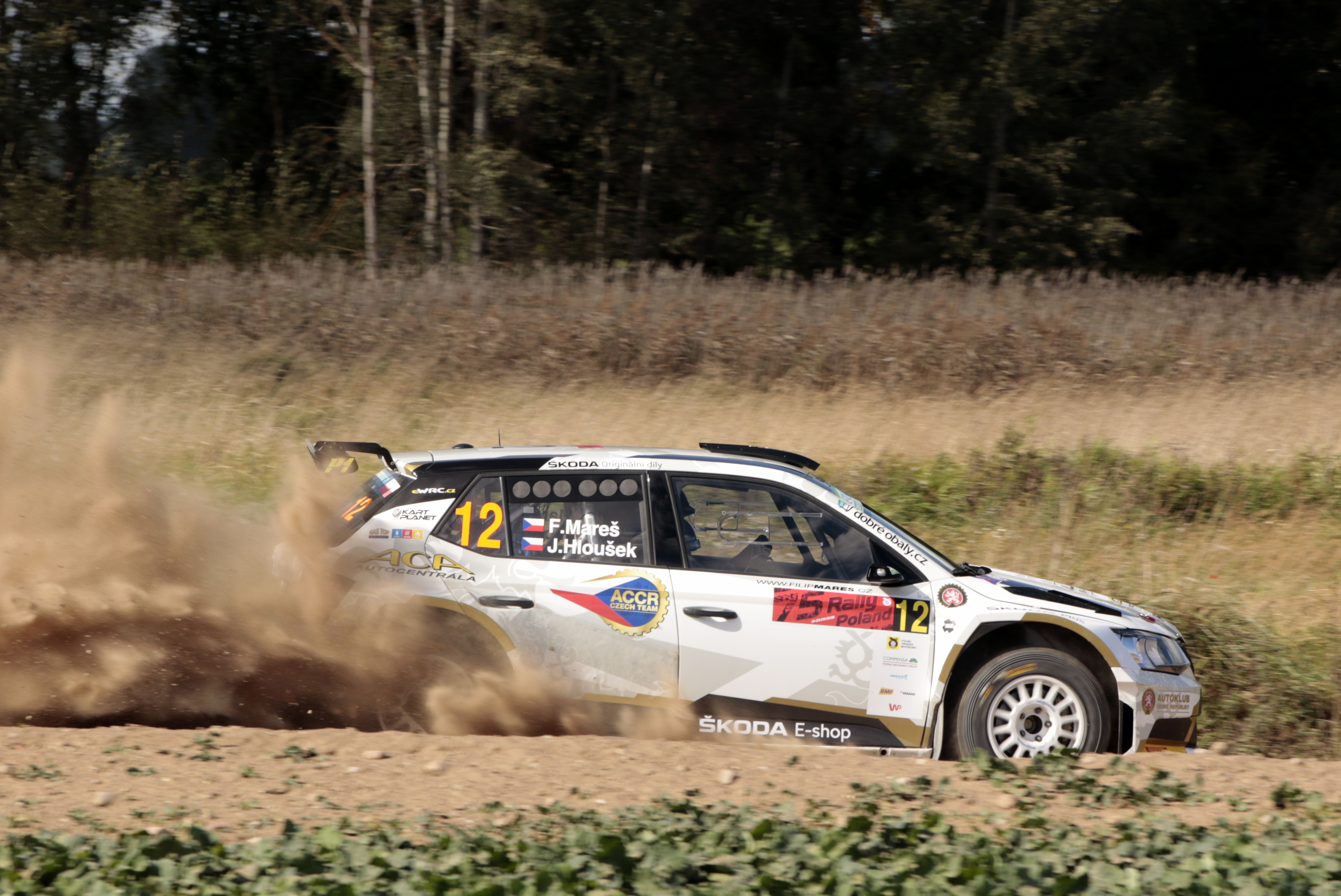 Rajd Polski - 2018 Filip Mareš